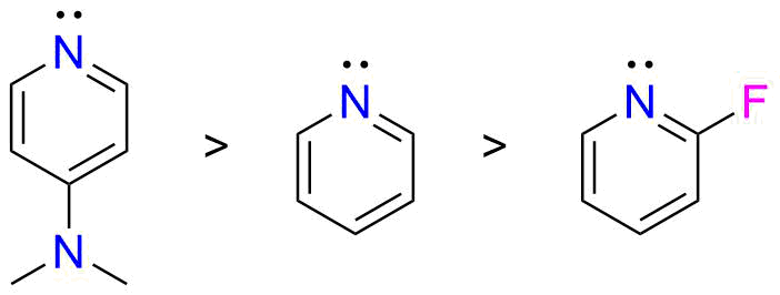 Substituoitujen pyridiinien suhteellinen nukleofiilisyys